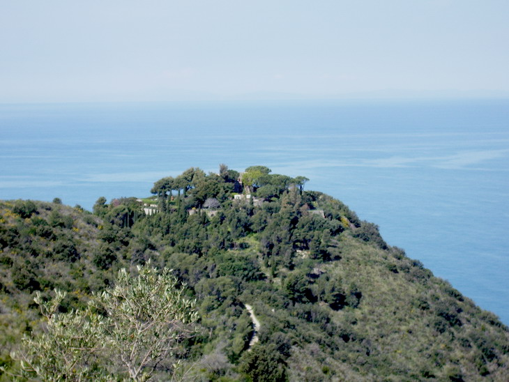 La Torre di Cala Grande occultata dalla macchia mediterranea a Monte Argentario